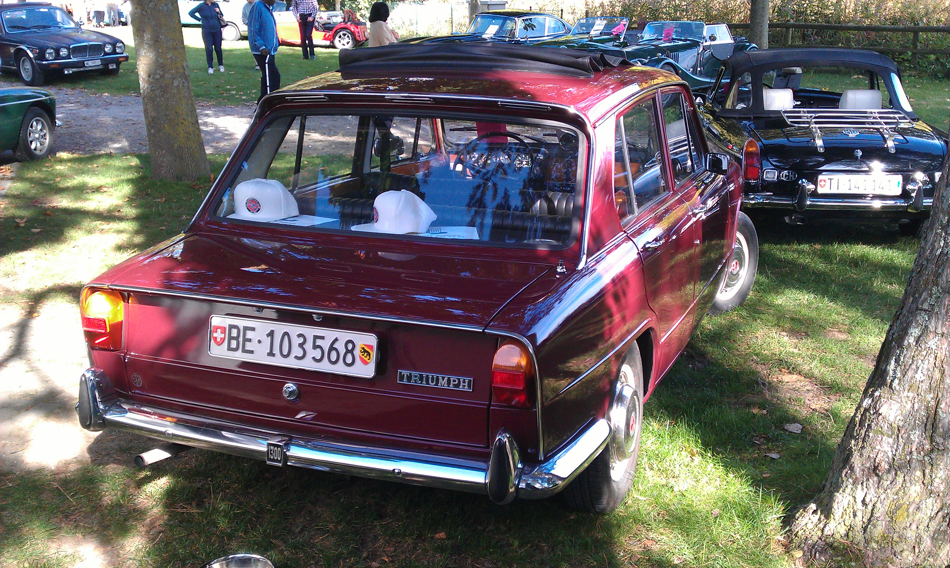 Triumph 1300